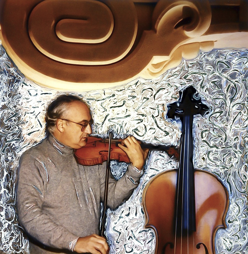 Fotopolaroid manipolata di Augusto De Luca, tratta dal libro "31 Napoletani di fine secolo", Electa Napoli - 1995.